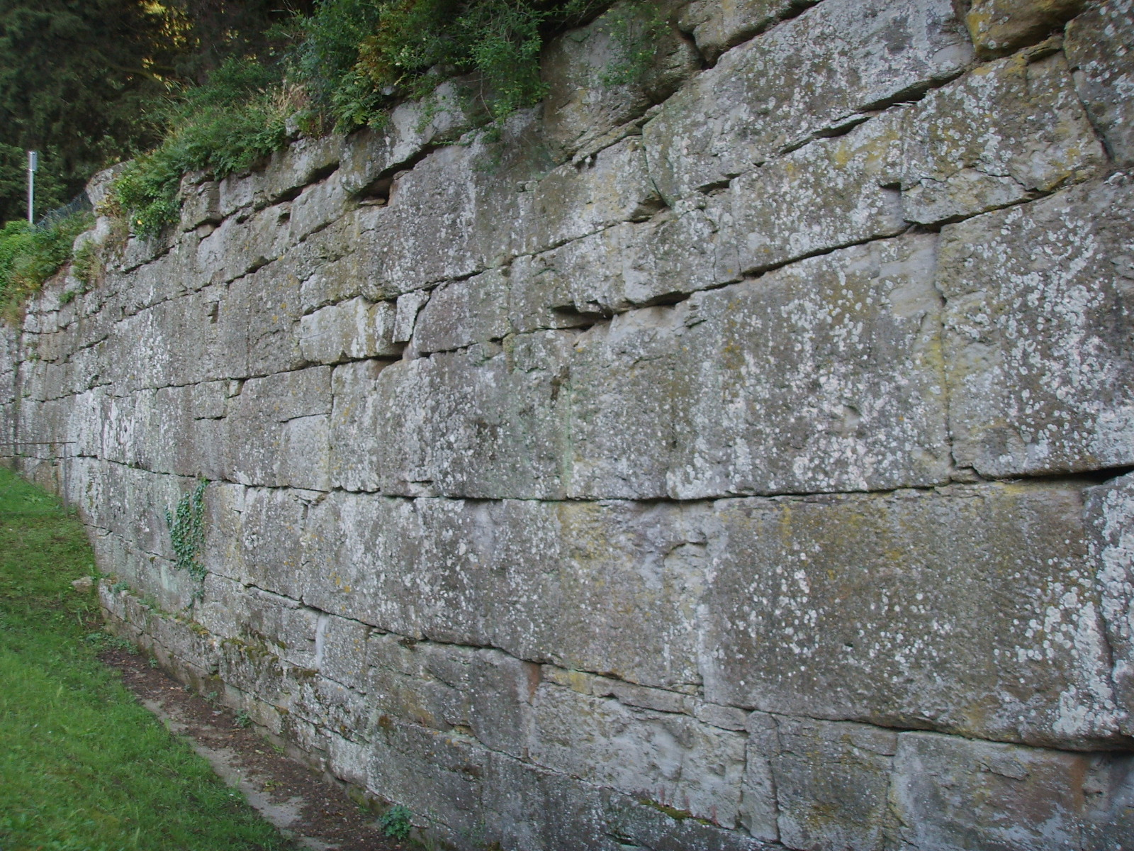 Mura etrusche di fiesole 04 blocchi ciclopici